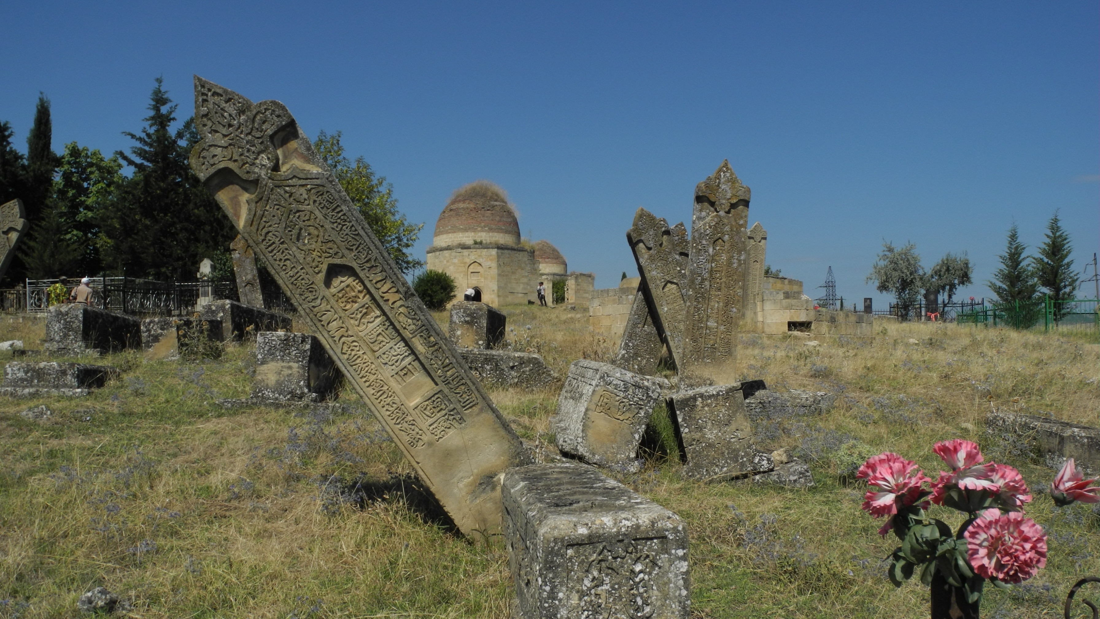 Shamakhi - Friedhof.JPG